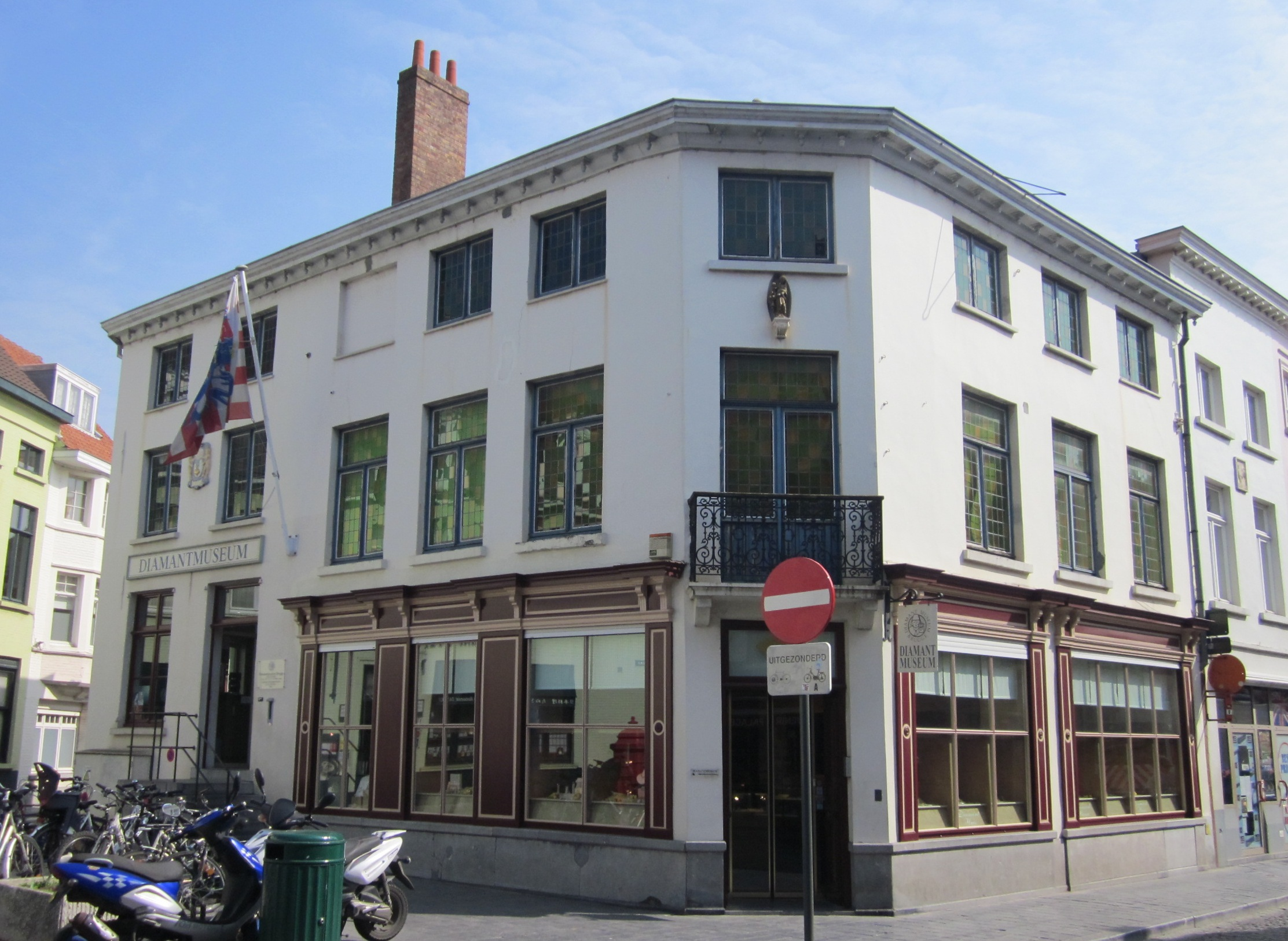 Diamantmuseum, Ankerplein, Brugge